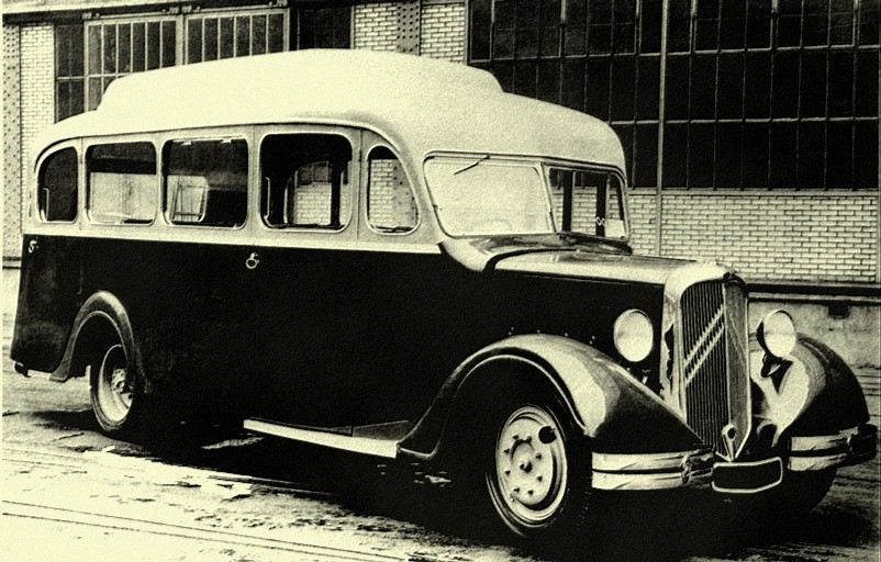 Oskenovane z citroen pub 30tych rokov